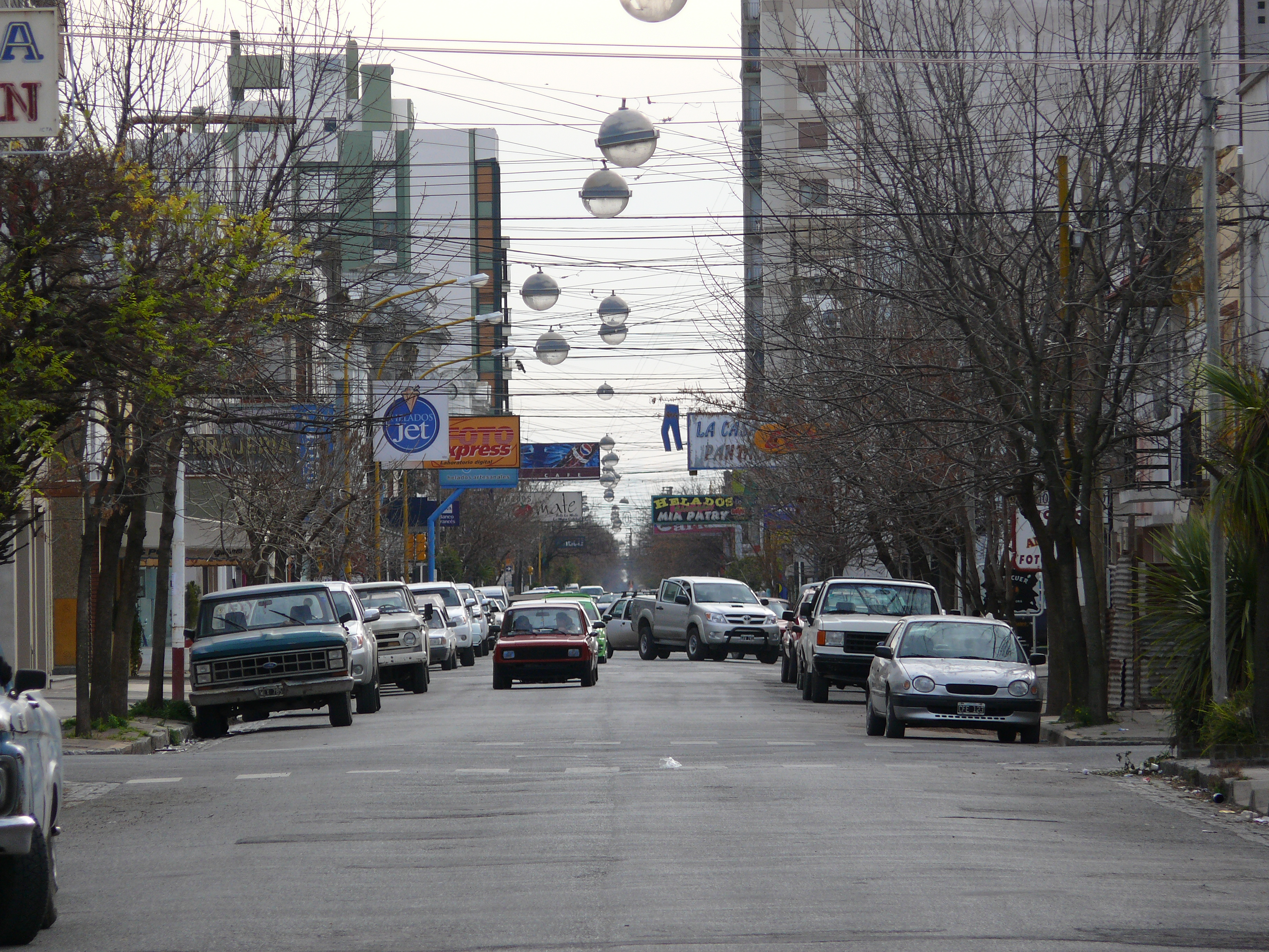 Colón Avenue, Tres Arroyos, Buenos Aires Province, Argentina.